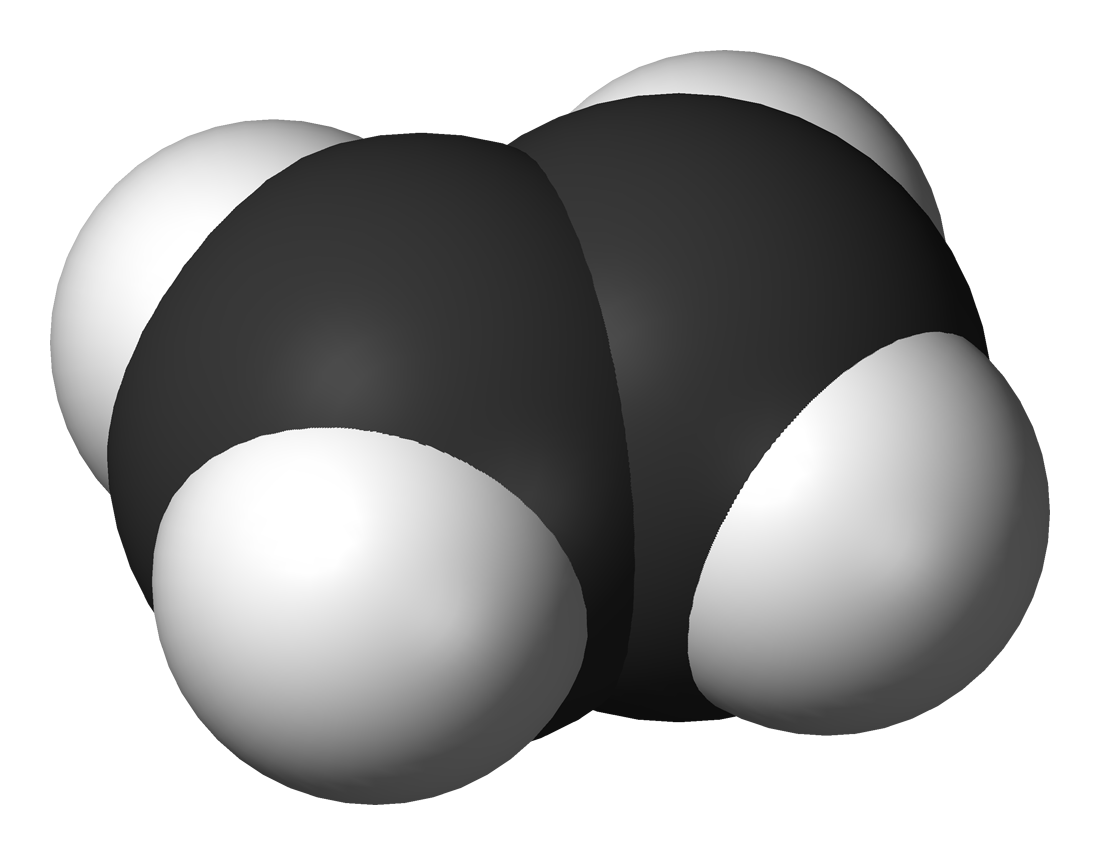 ethylene